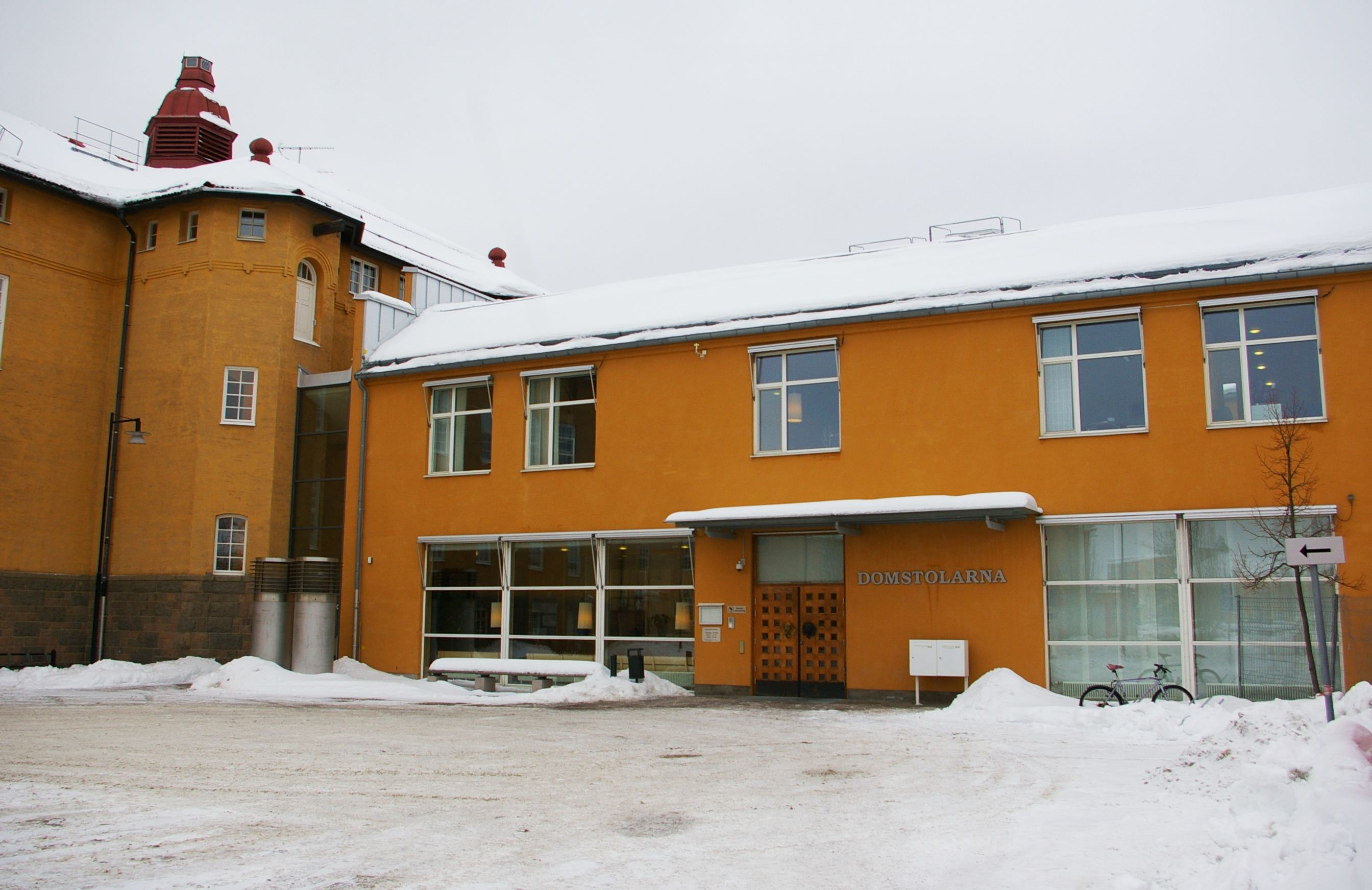 Domstolarna i Linköping.